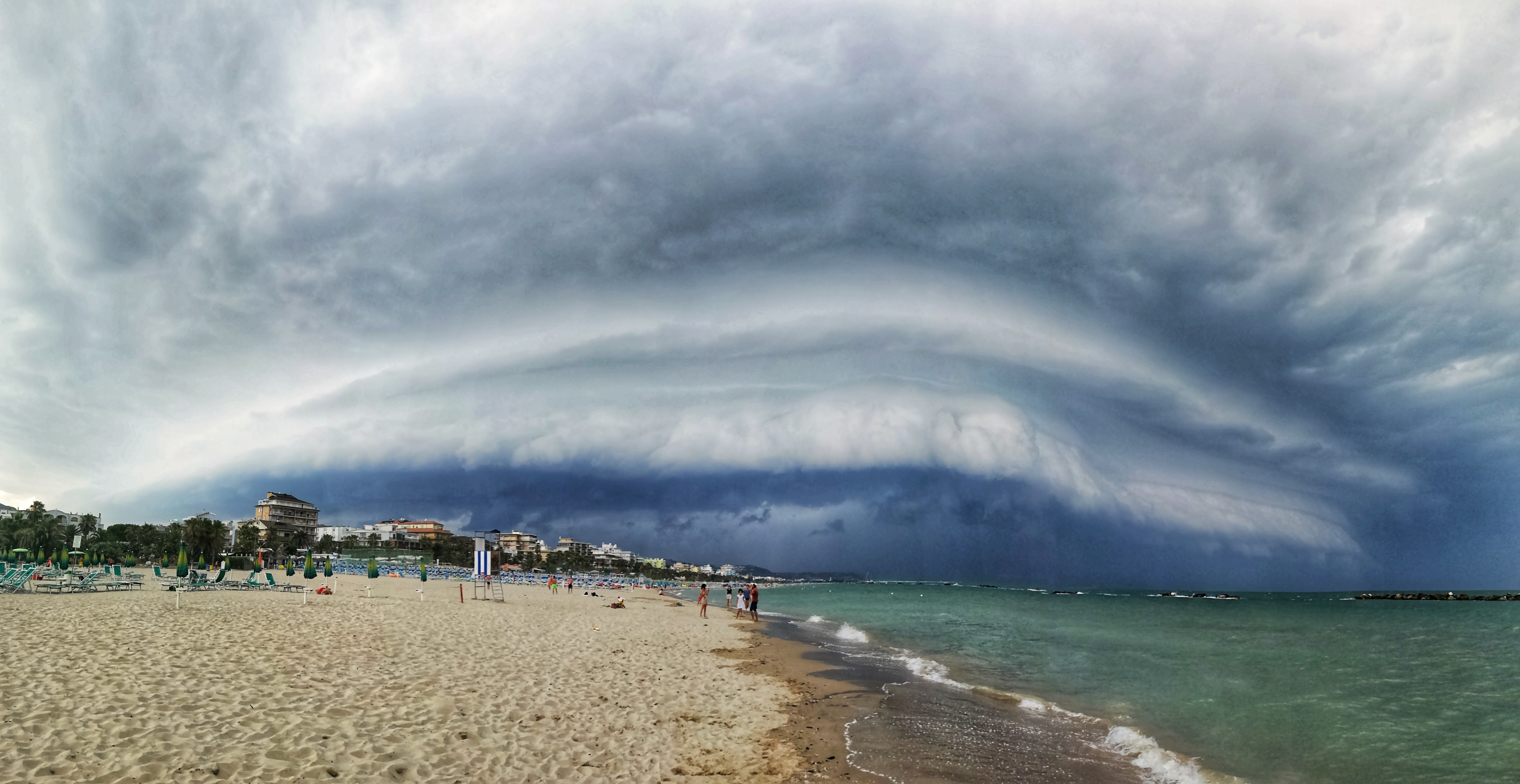 Silná bouřka s shelf cloudem 9. července 2019 ve východní Itálii.